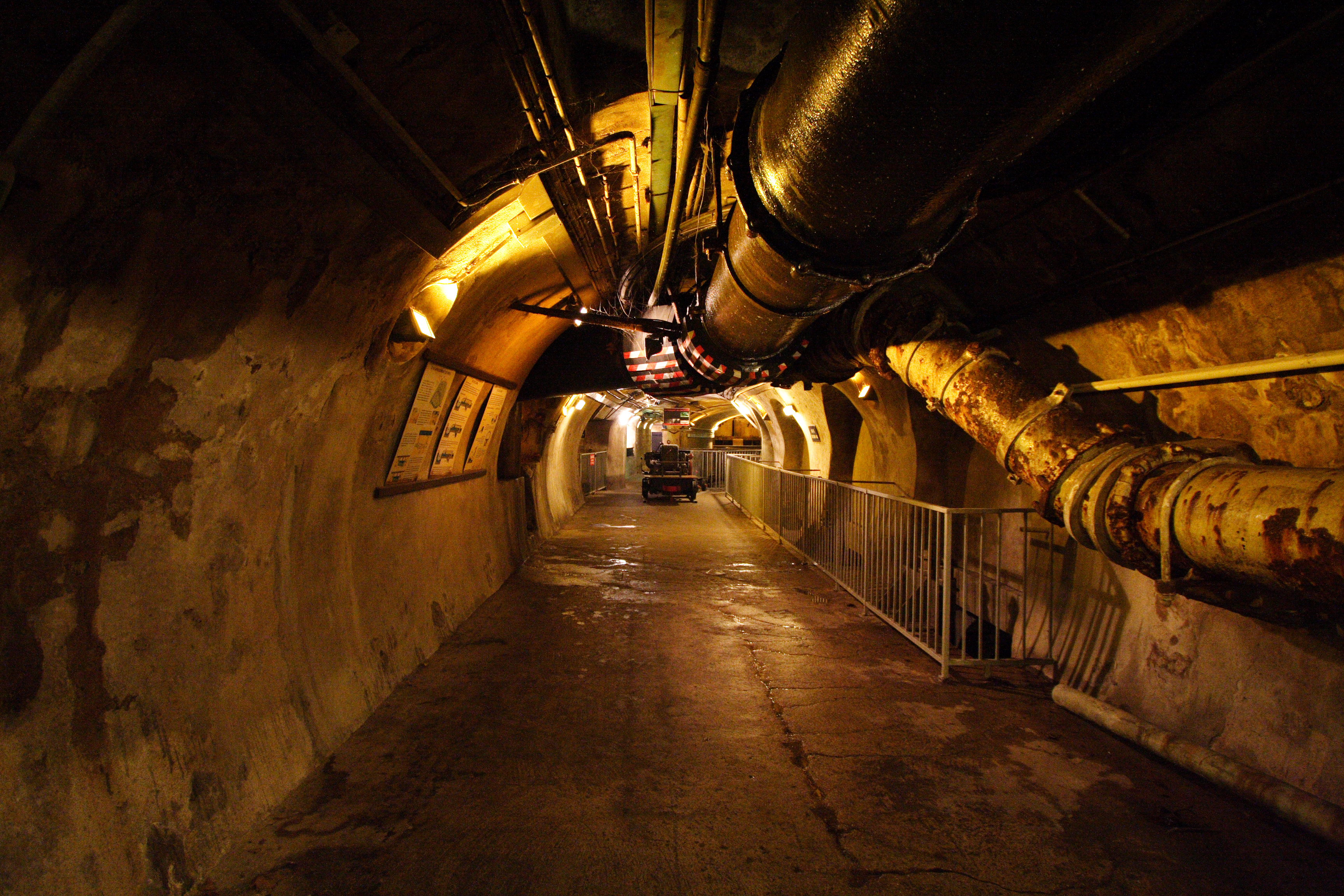 Musée des Égouts de Paris(Paris, France)